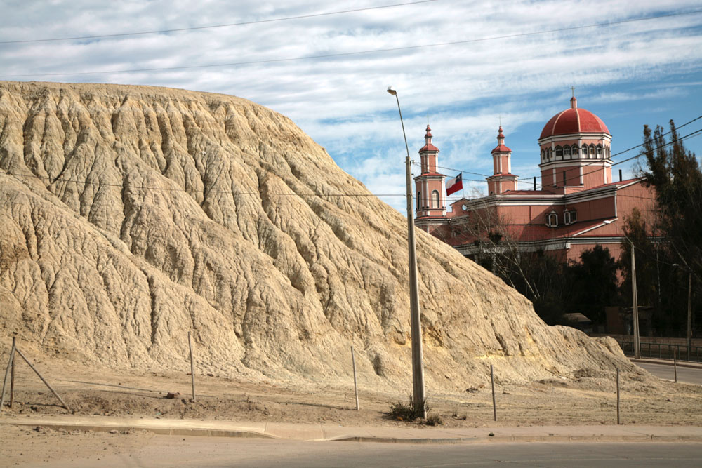 Iglesia grande de Andacollo This is a photo of a national monument in Chile: 604